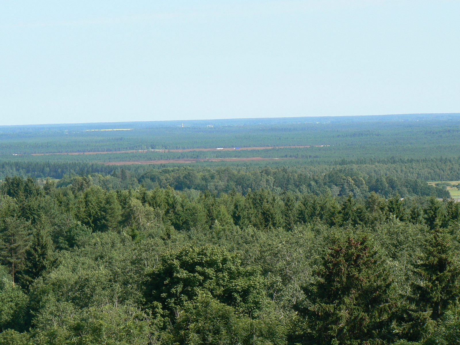 Turbatootmine Peetla rabas